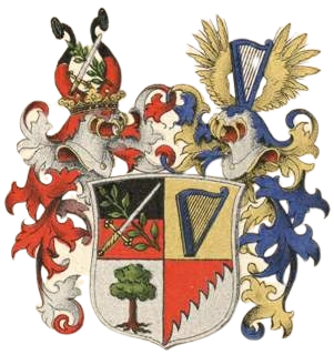 Harpe suguvõsa aadlivapp (2)